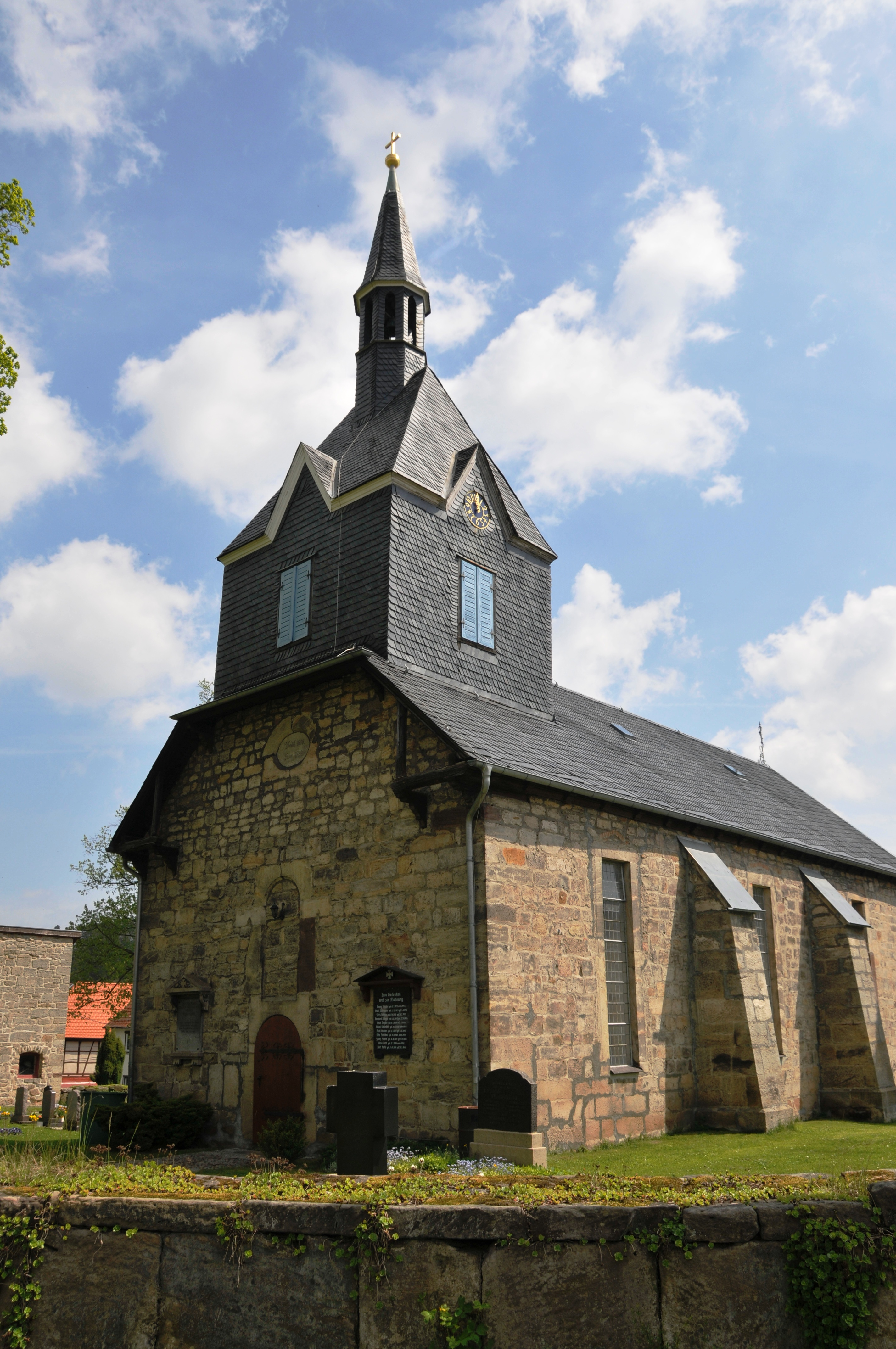 Gösselborn, Kirche